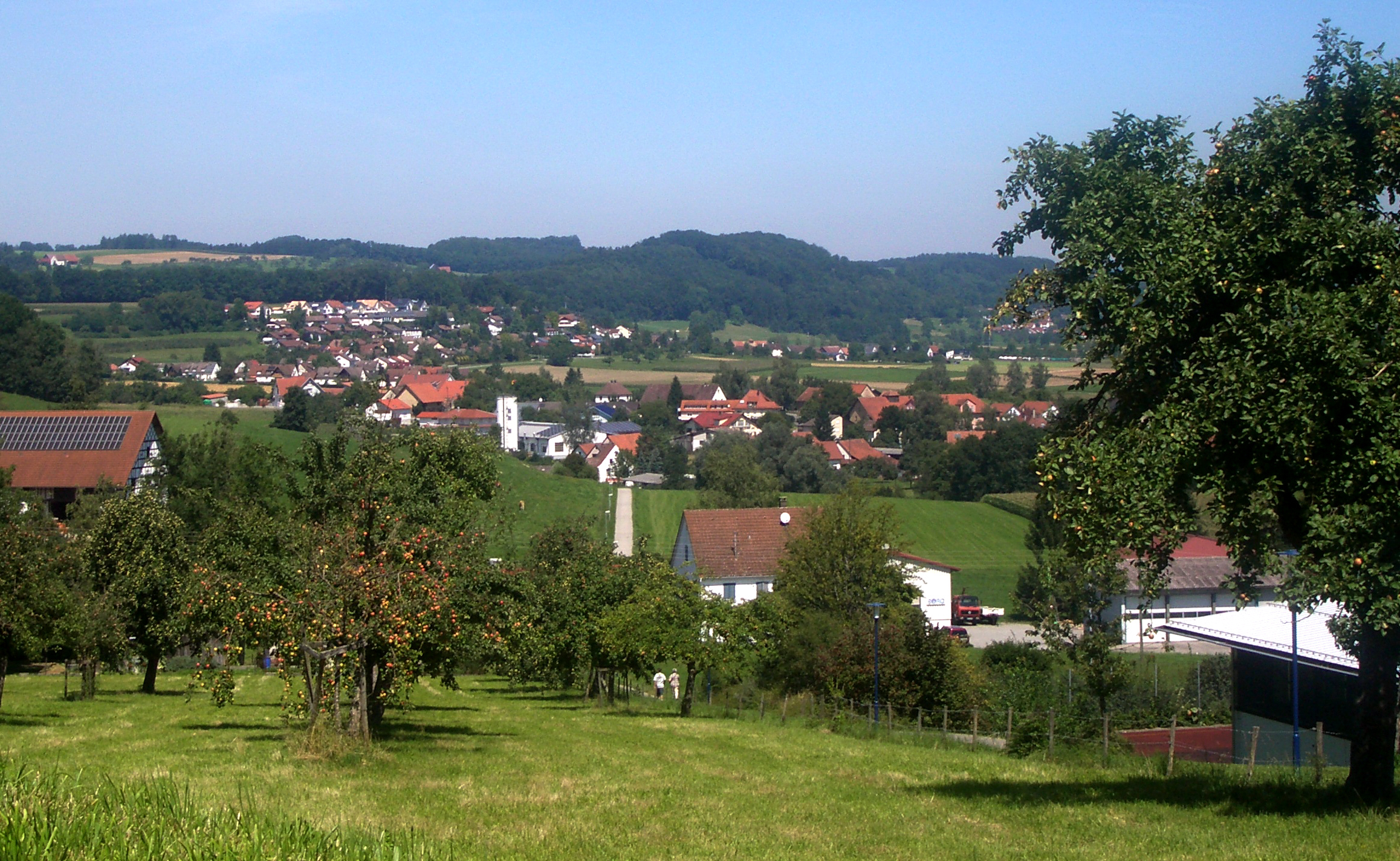 D-88276 Berg: Blick von Berg auf den Ortsteil Ettishofen (im Hintergrund übergehend in den Ortsteil Weiler)